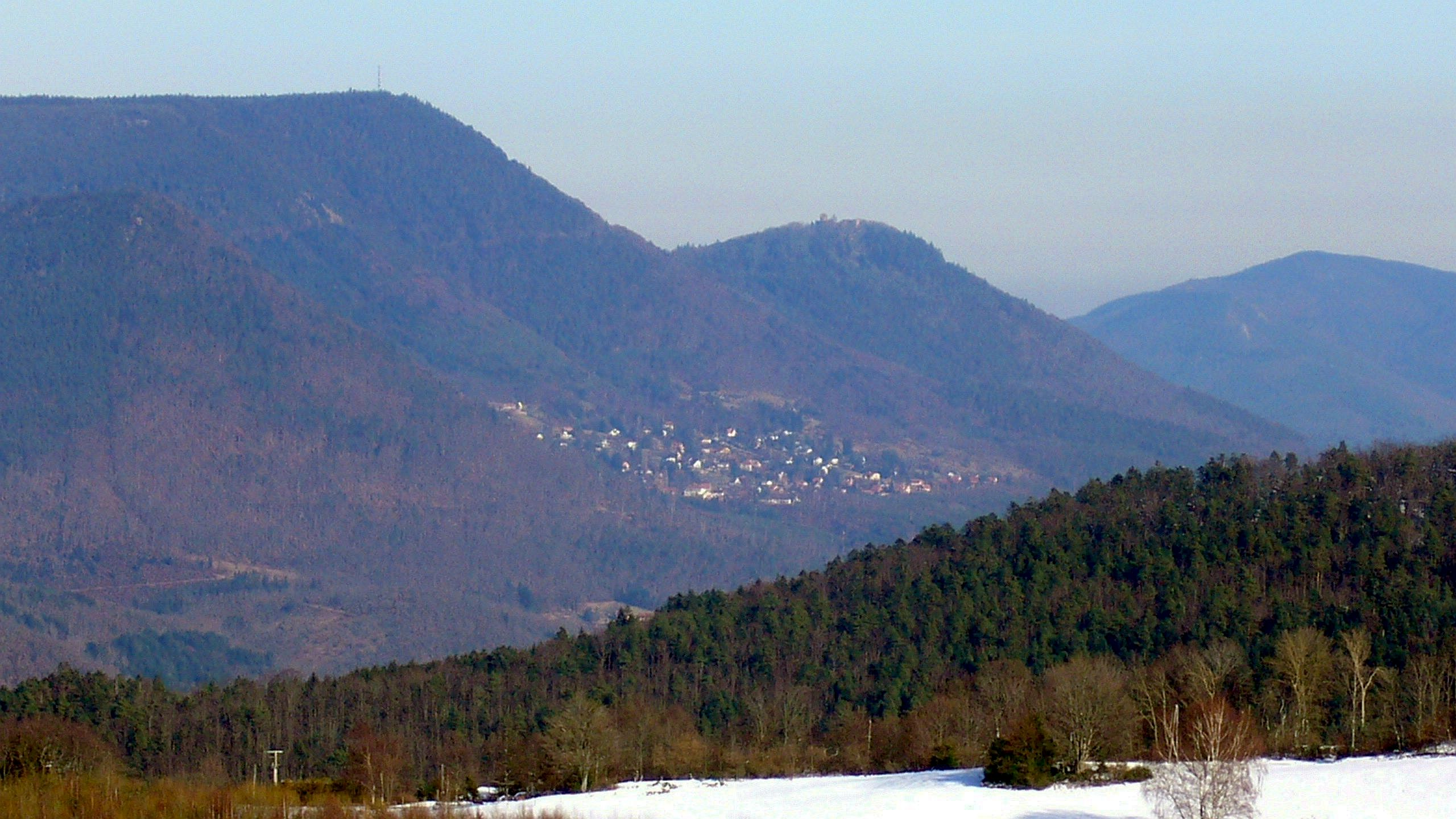 Vue sur le village de La Vancelle, le Rocher du Coucou (sommet de gauche) et le Château du Frankenbourg (sommet à droite). Photo prise depuis le Col du Petit Haut faisant partie de la ville de Sainte Marie-aux-Mines